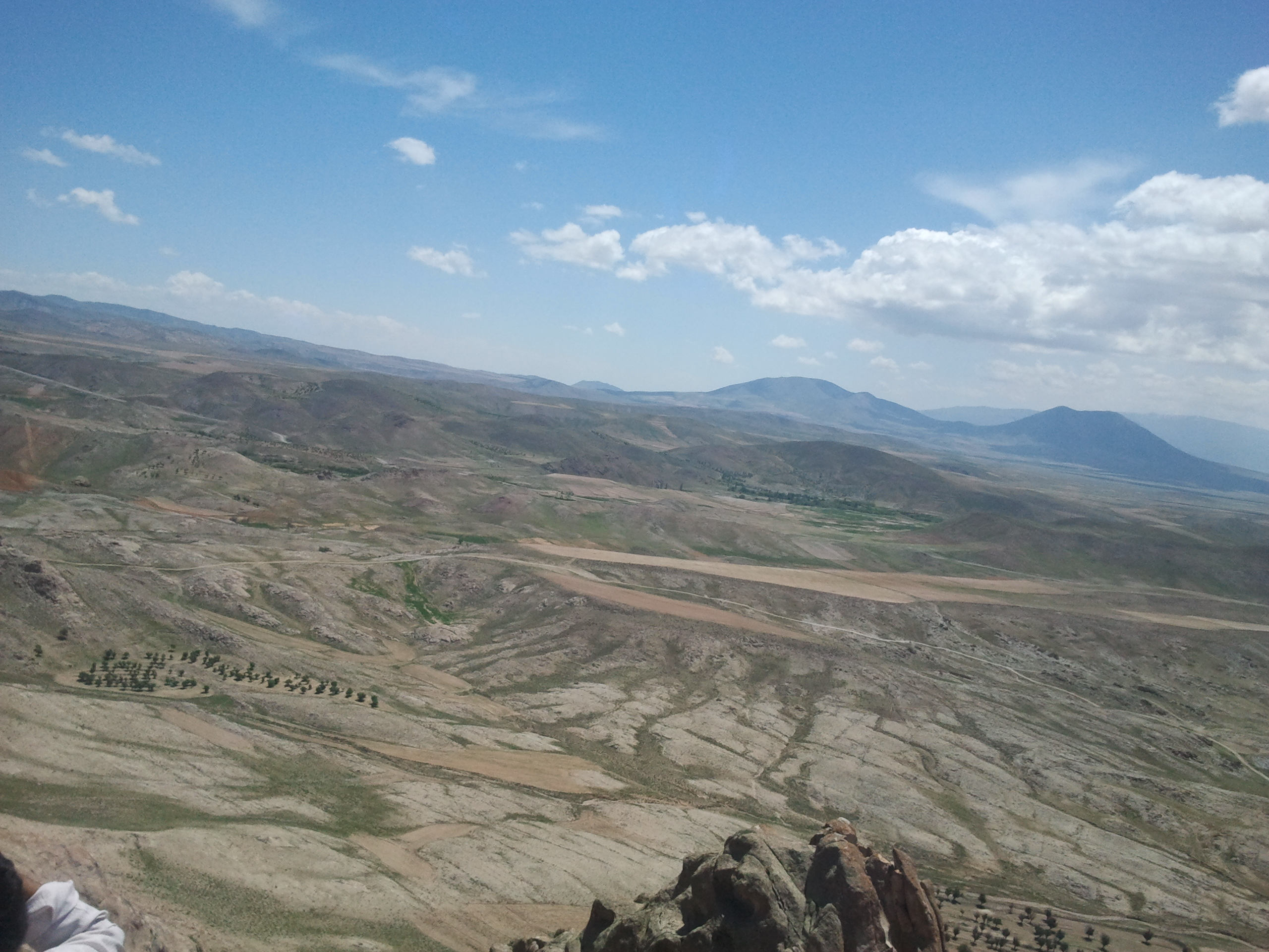 دورنمایی زیبااز بینالود